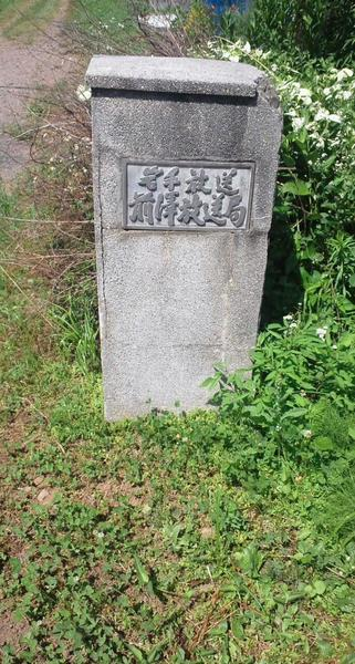 IBC前沢送信所